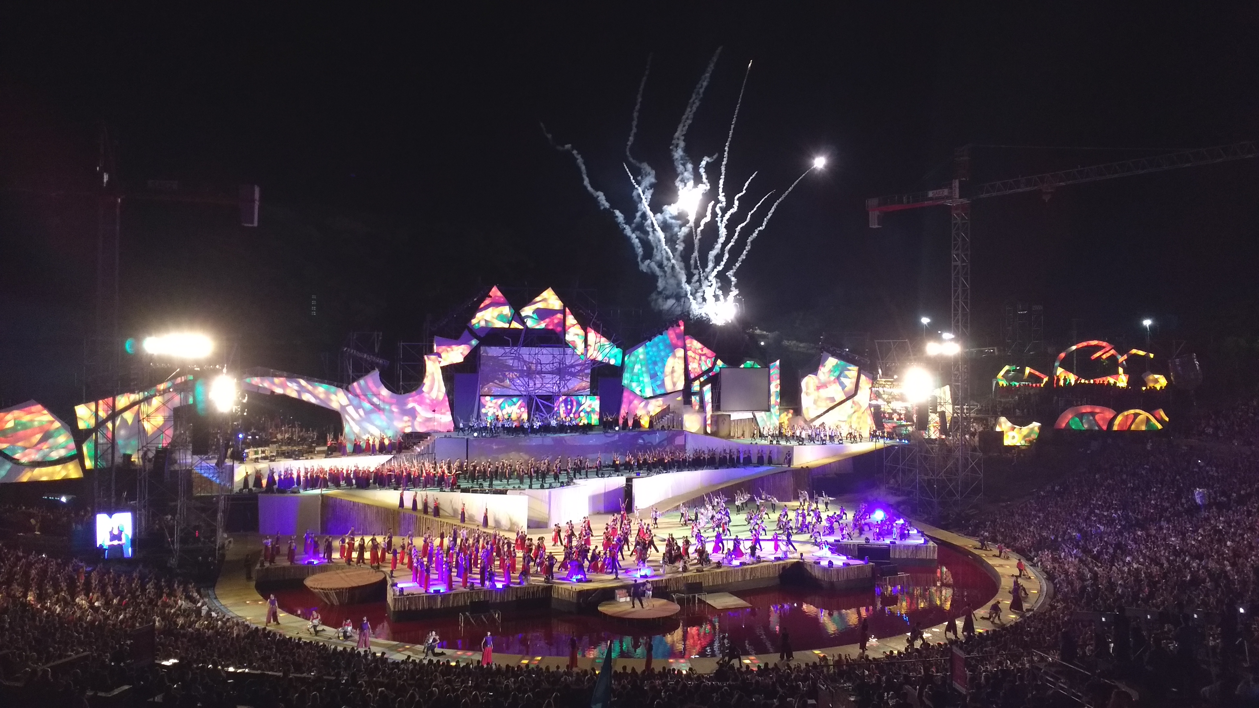 Acto Central de la Fiesta Nacional de la Vendimia 2017